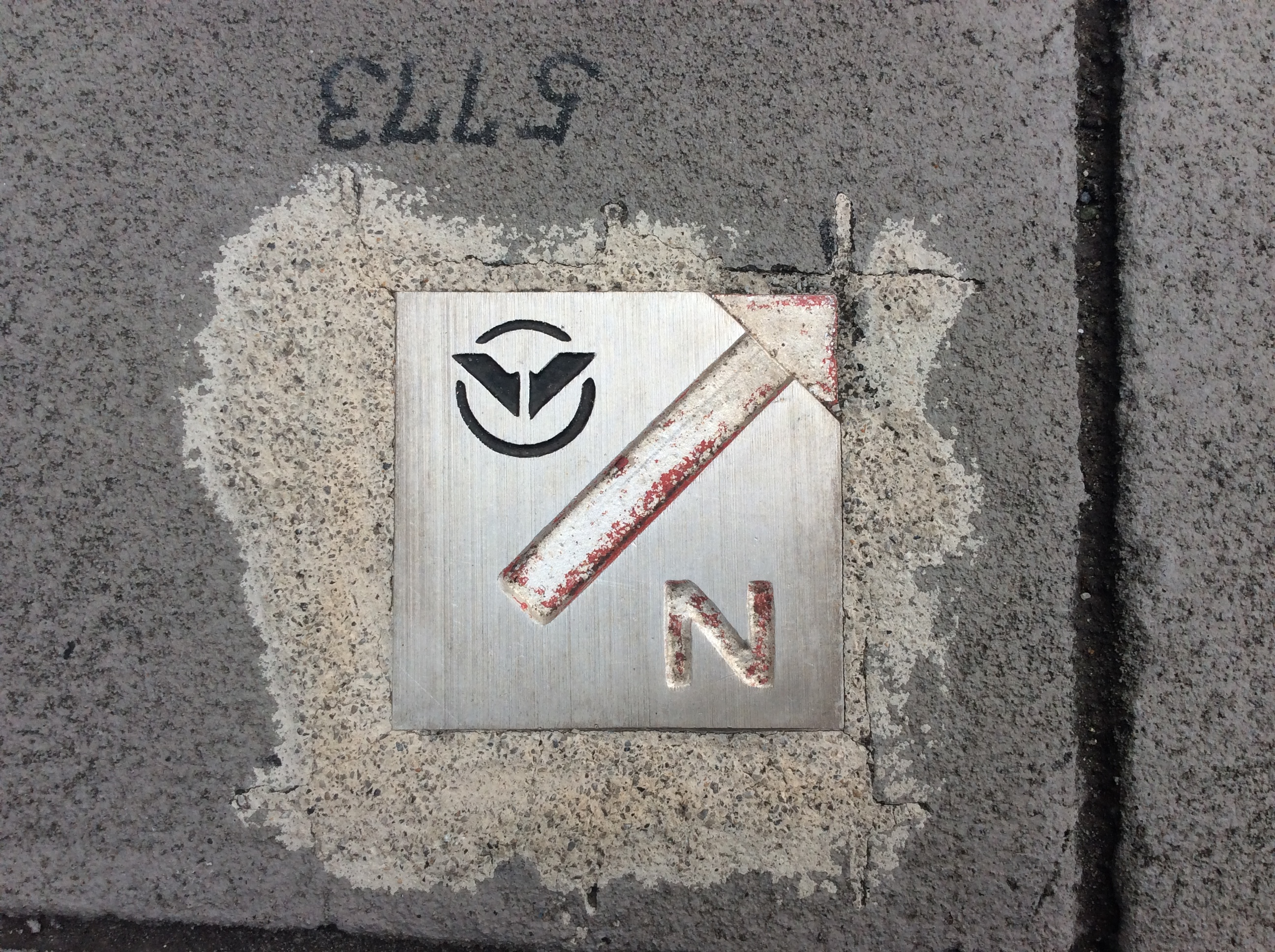 南海電気鉄道の土地境界標